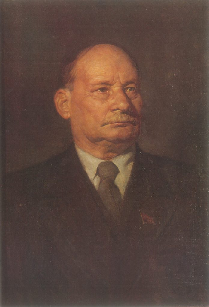 В.Волкаў. Партрэт Якуба Коласа. 1960